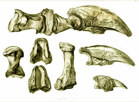 Le Paresseux terrestre, ou paresseux géant d'Amérique du Nord (autrefois nommé Megalonyx ou Mégathère de Jefferson), dont le nom scientifique est Megalonyx jeffersonii est une espèce éteinte qui a vécu en Amérique du Nord lors du Pléistocène. Les anglophones le nomment « giant ground sloth » ou « Jefferson's ground sloth ». Selon les squelettes découverts aux USA, certains individus dépassaient 2 m de hauteur.